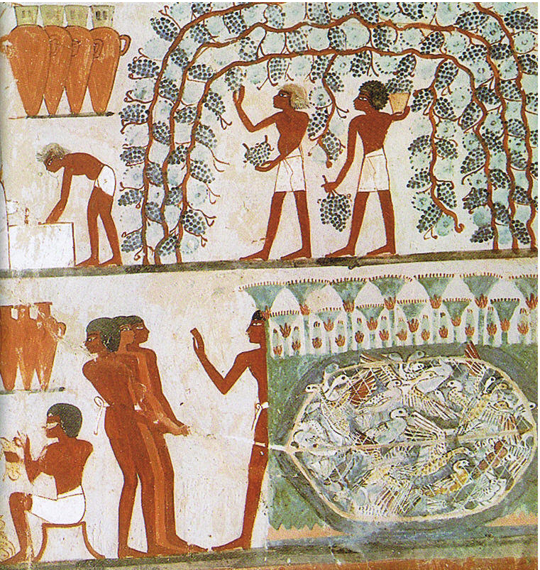 ober Weinlese, unten Vogelfang